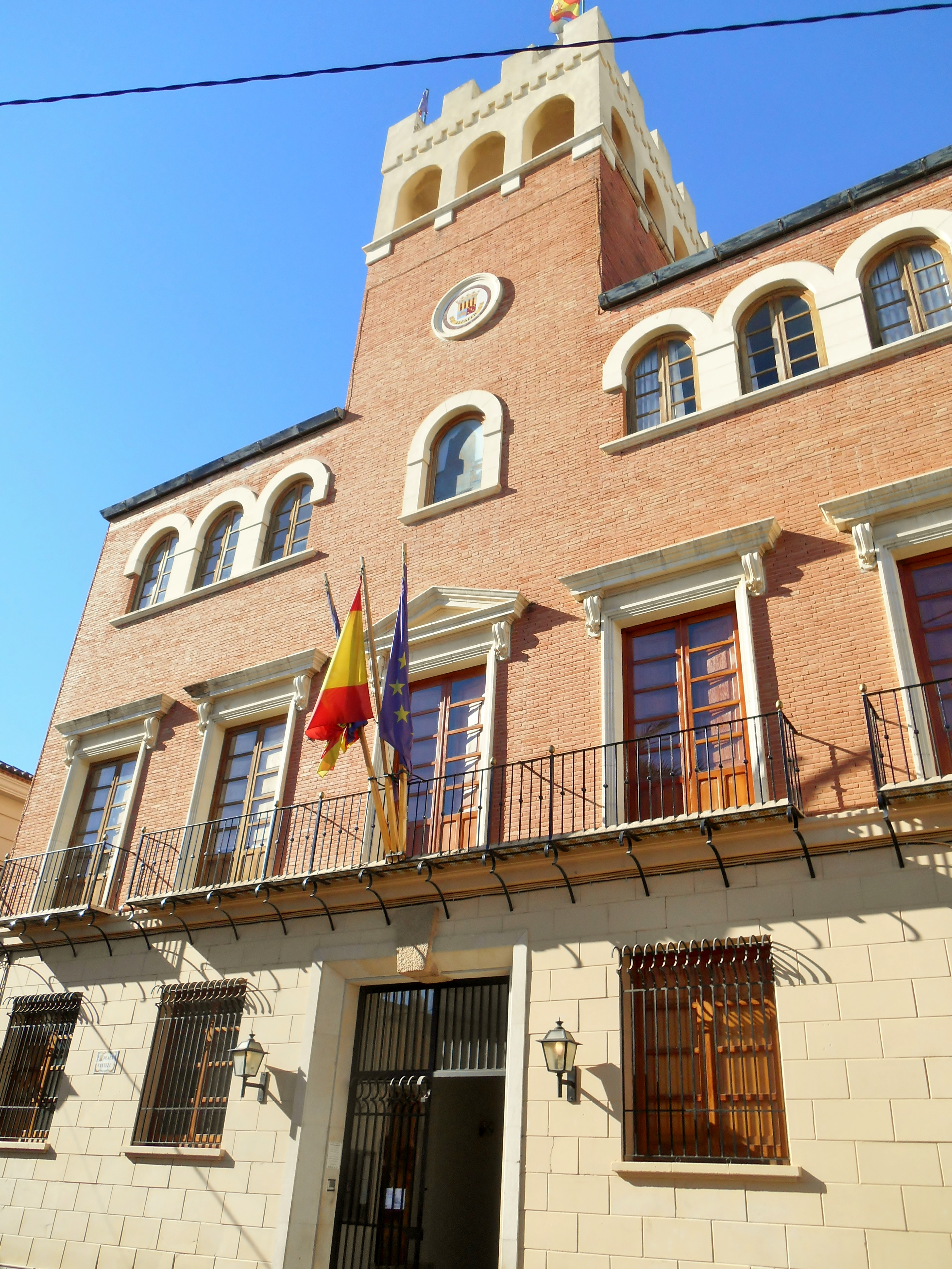 Alcàsser. 16.015-002.